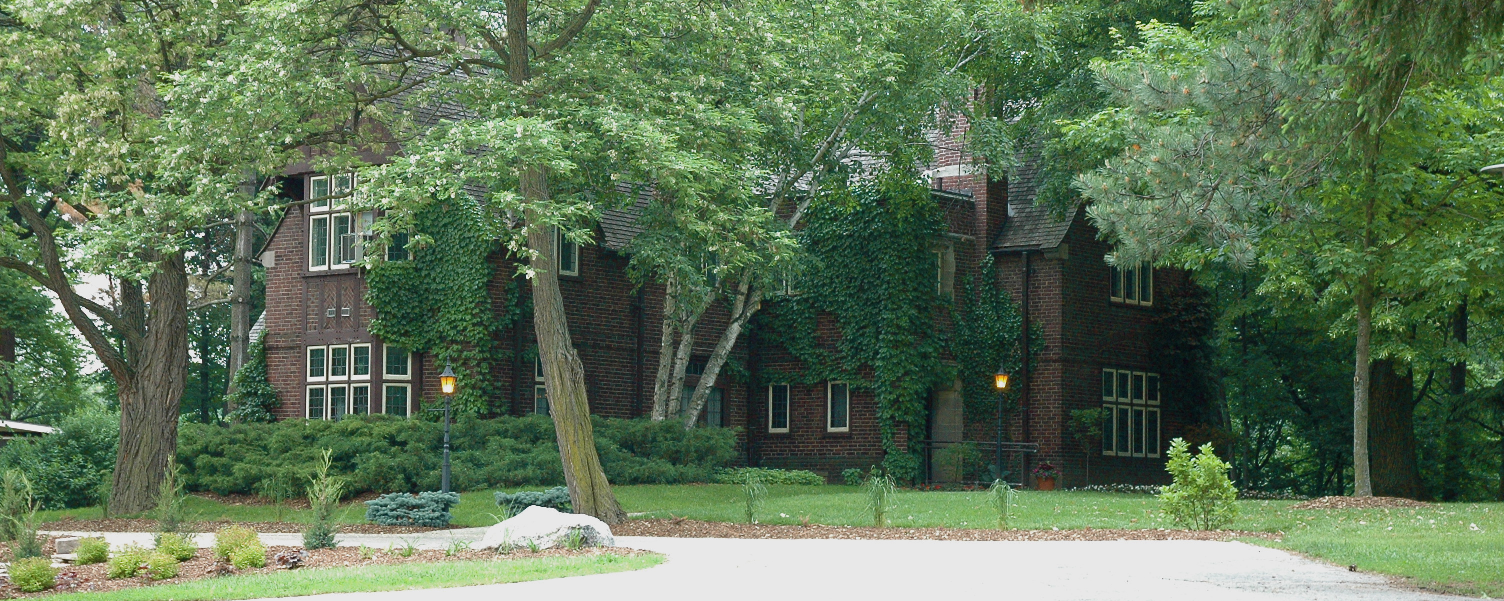 President's Residence - nice place.